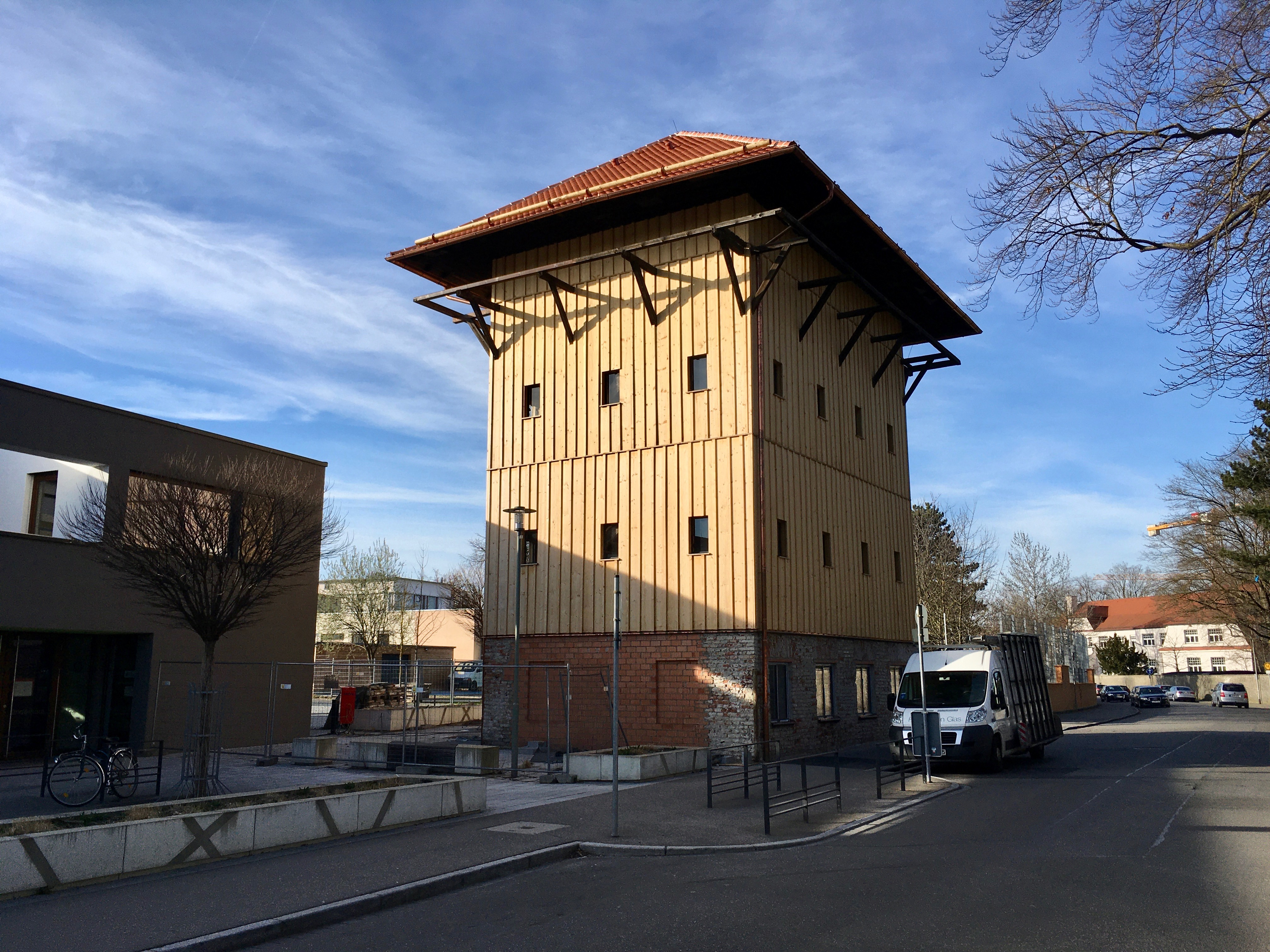 Der Färberturm im Augsburger Textilviertel mit neuer Holzverkleidung